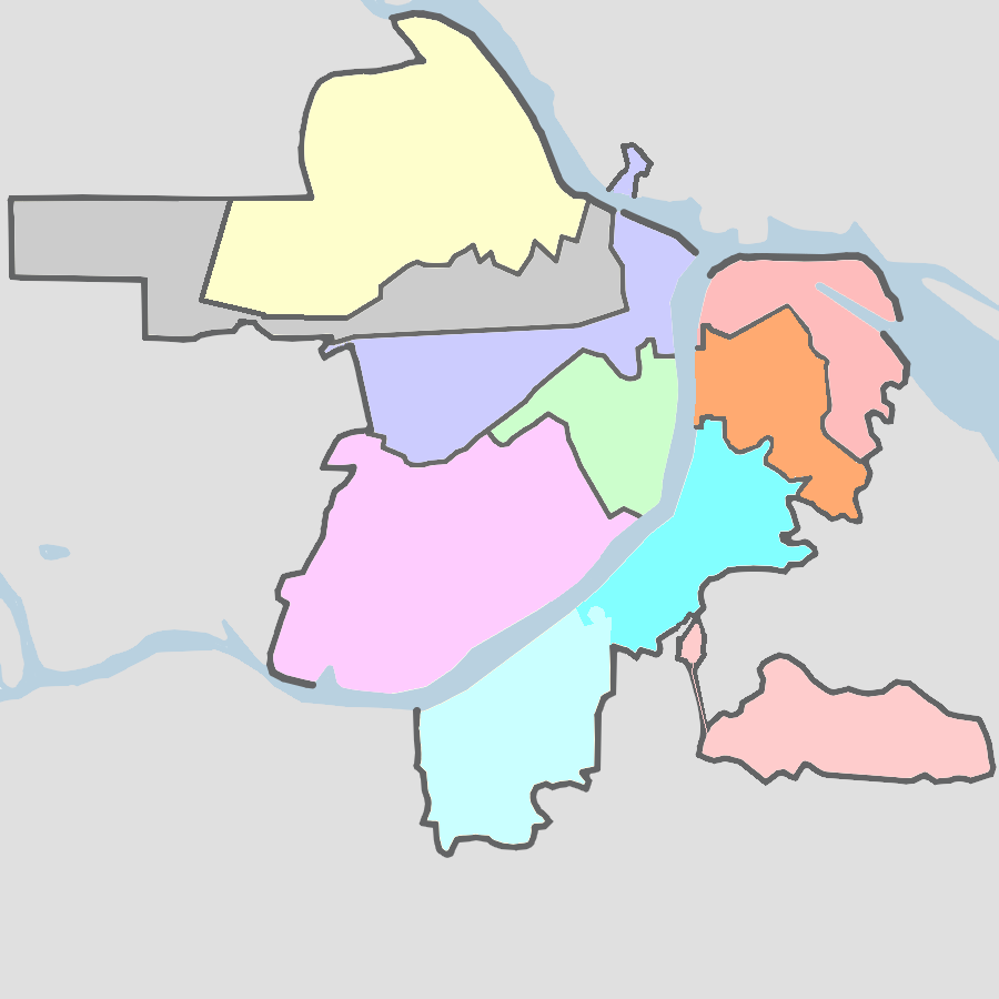 Карта районов Нижнего Новгорода на 2020 год